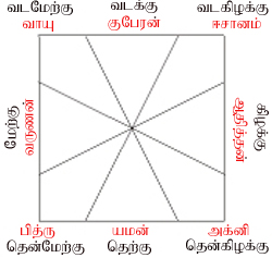 வாஸ்து திக்கு அதிபதிகள்